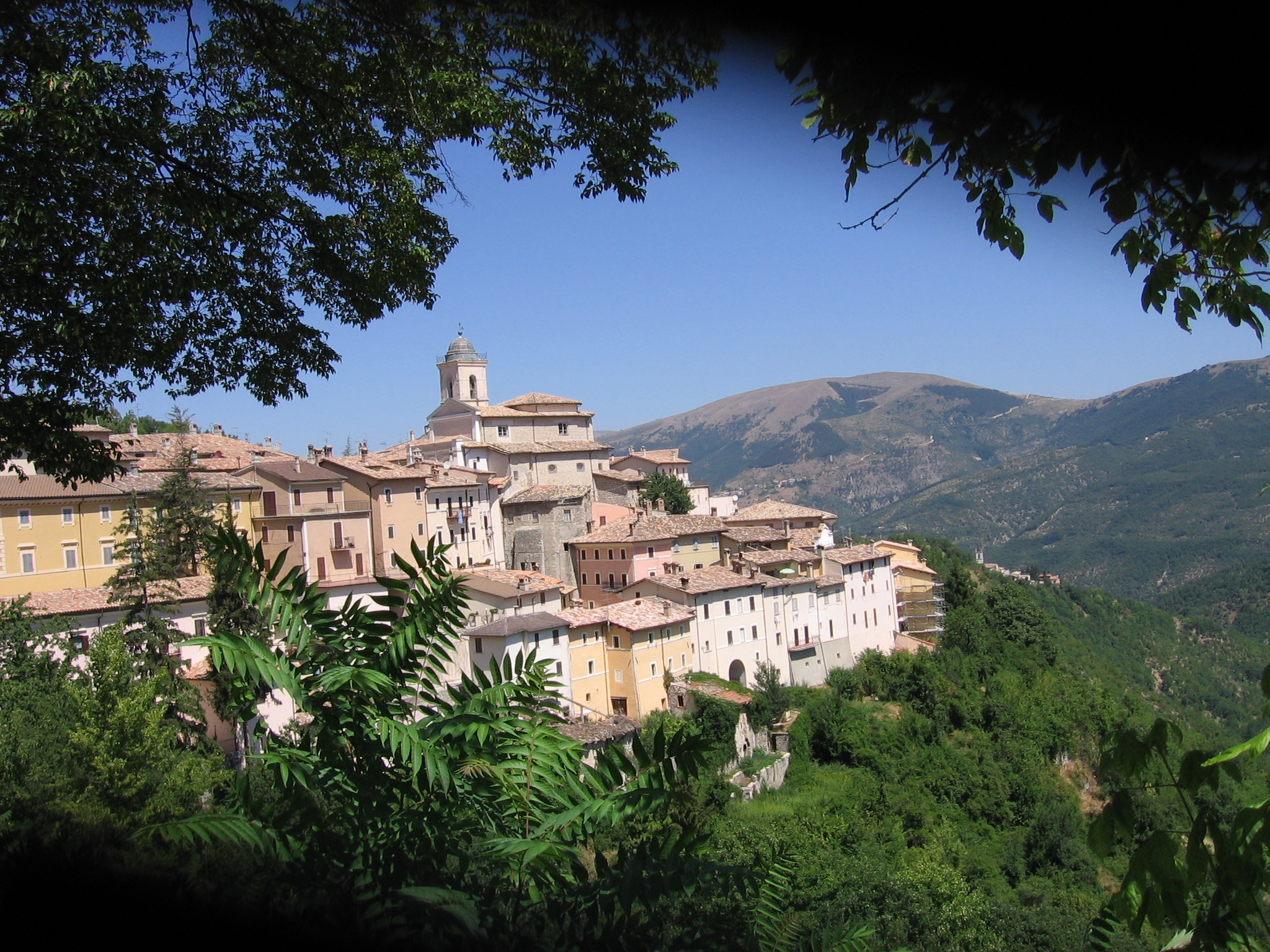 Foto door mijzelf genomen tijdens vakantie in Italië in 2005